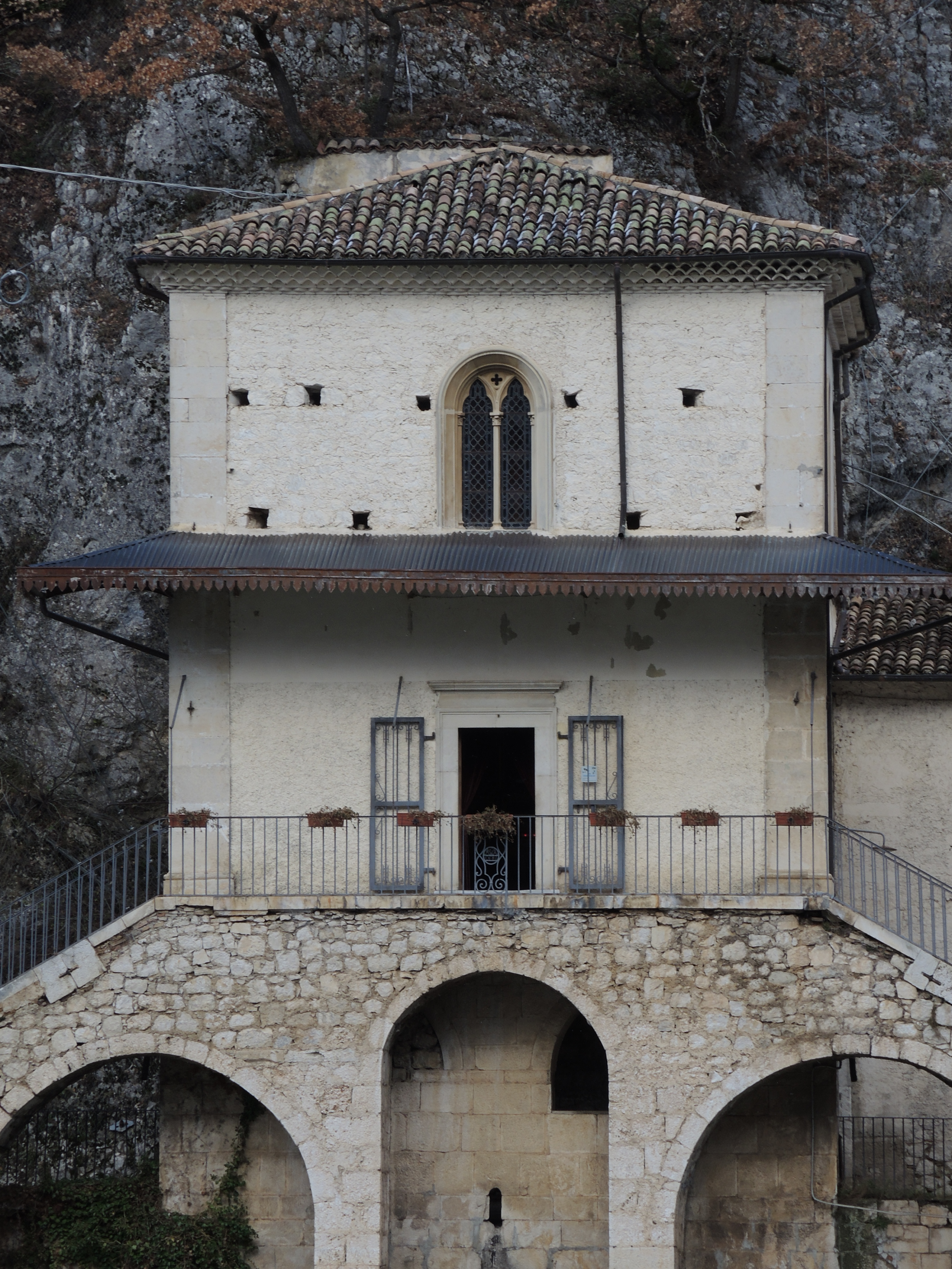 Scanno: Chiesa della Madonna del Lago